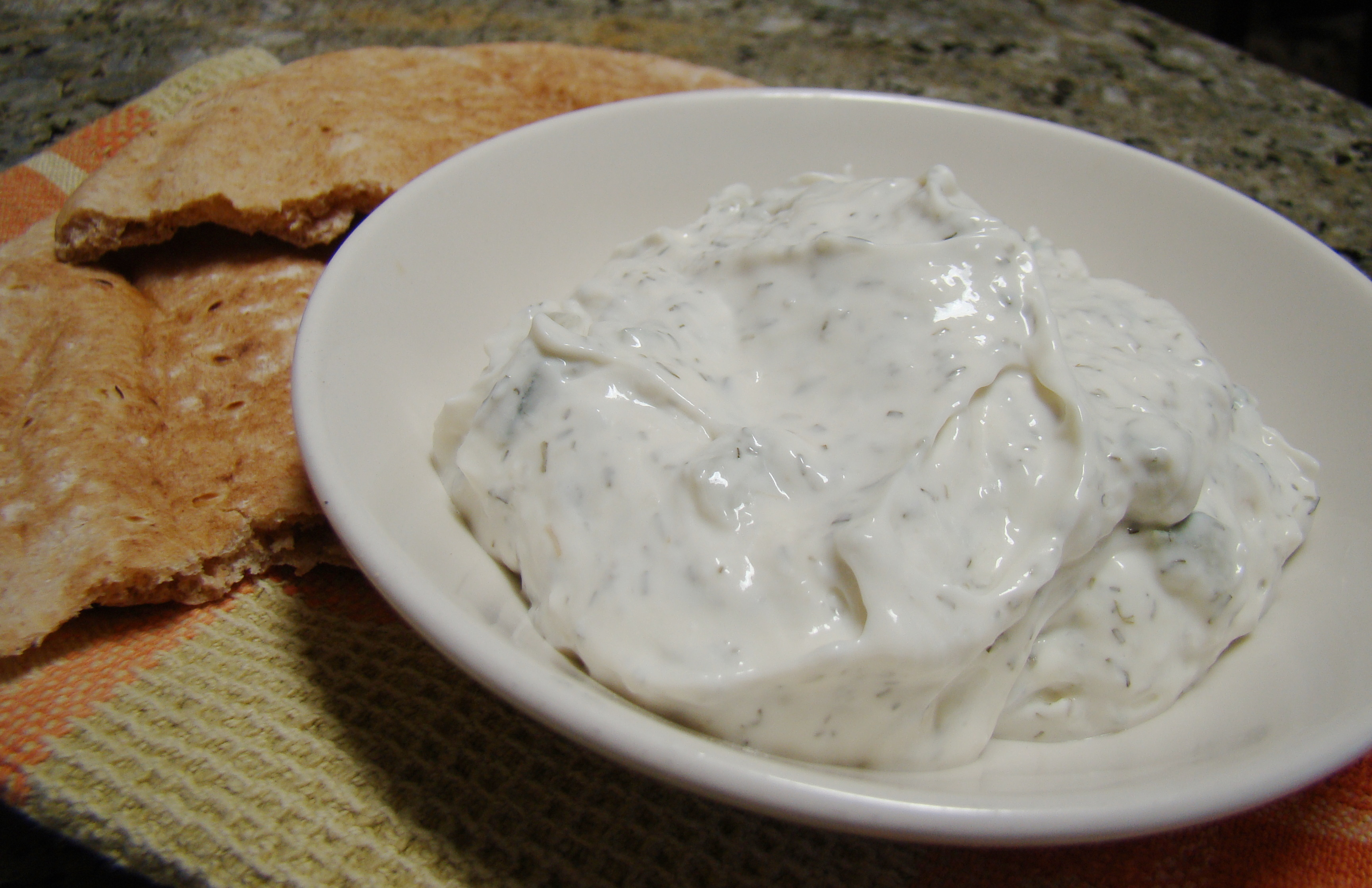 Tzatiki